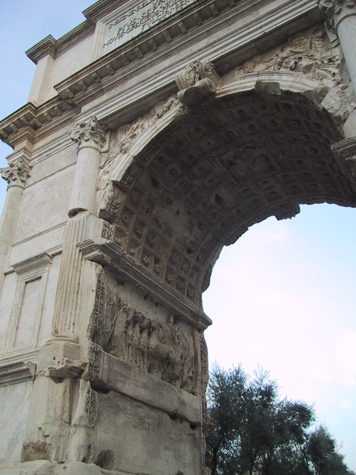 Arch of Titus, view of inside and relief of Titus' Triumph. Arc de Titus, vue de la voûte à caissons et du bas-relief du cortège triomphale, avec le char de Titus. Personnal picture